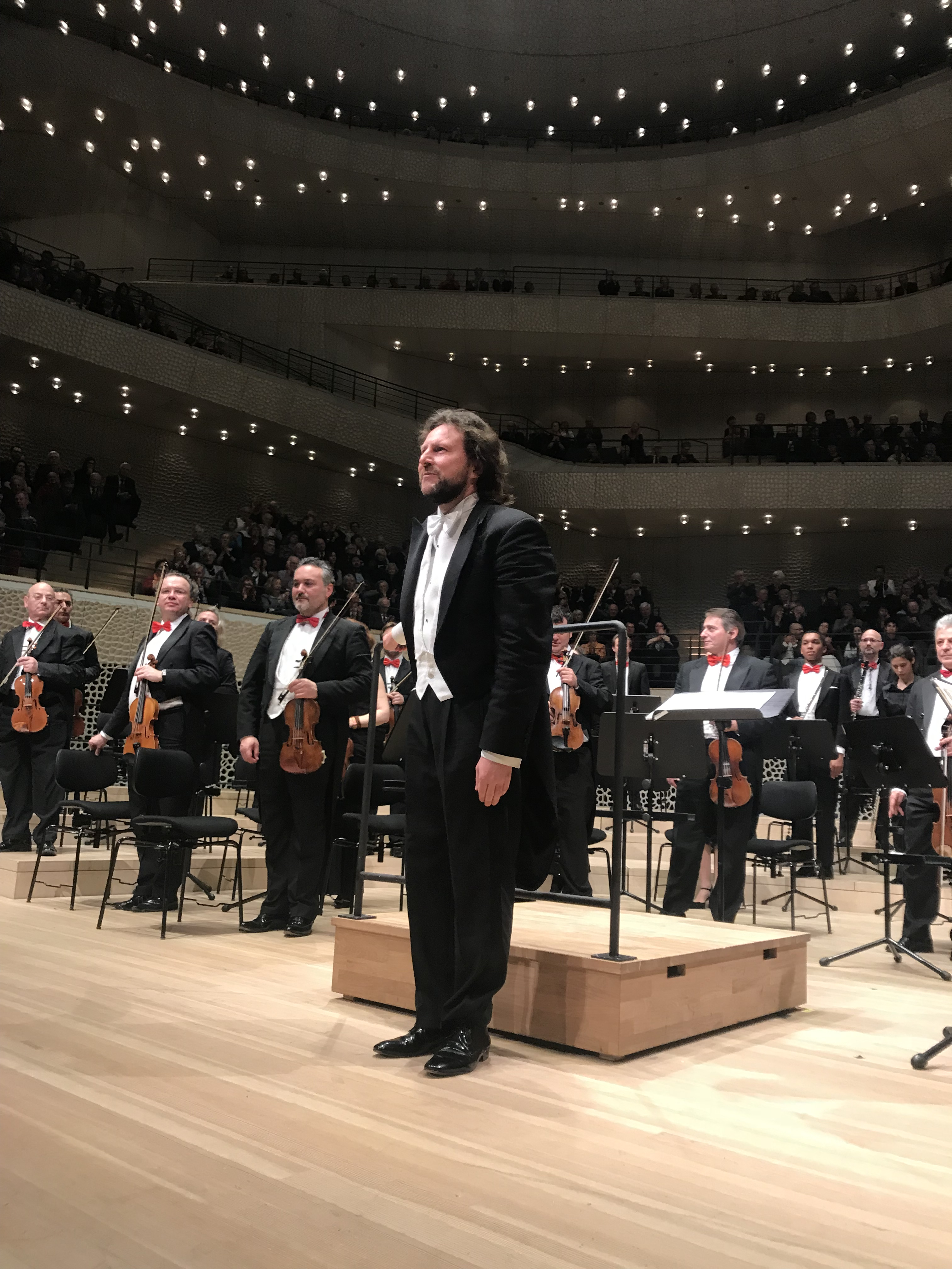 Bild